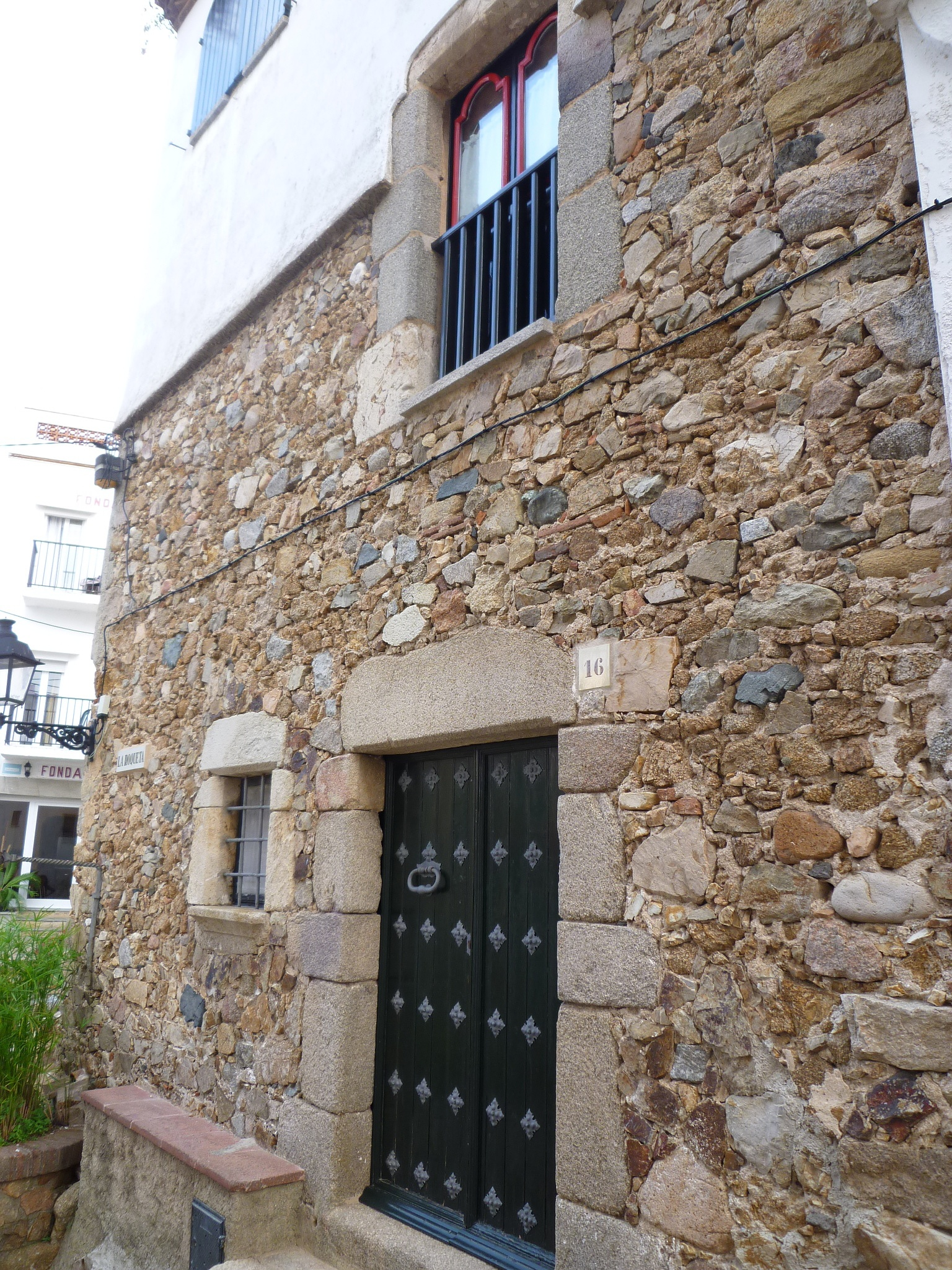 Habitatge al carrer Roqueta, 16 (Tossa de Mar)